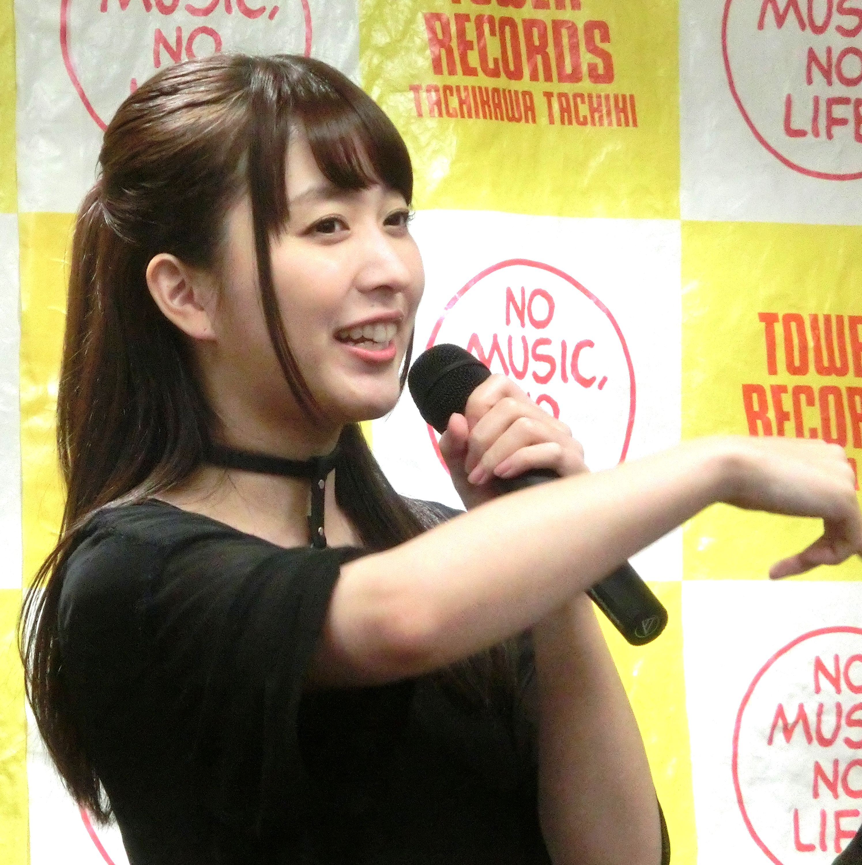 僕らはうそつき インストアライブ